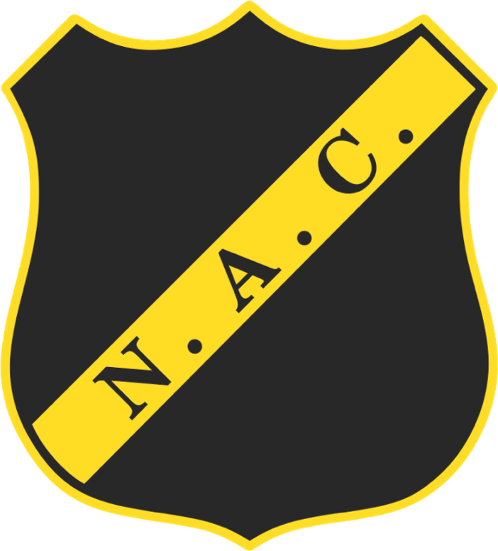 Logo NAC Breda 2012